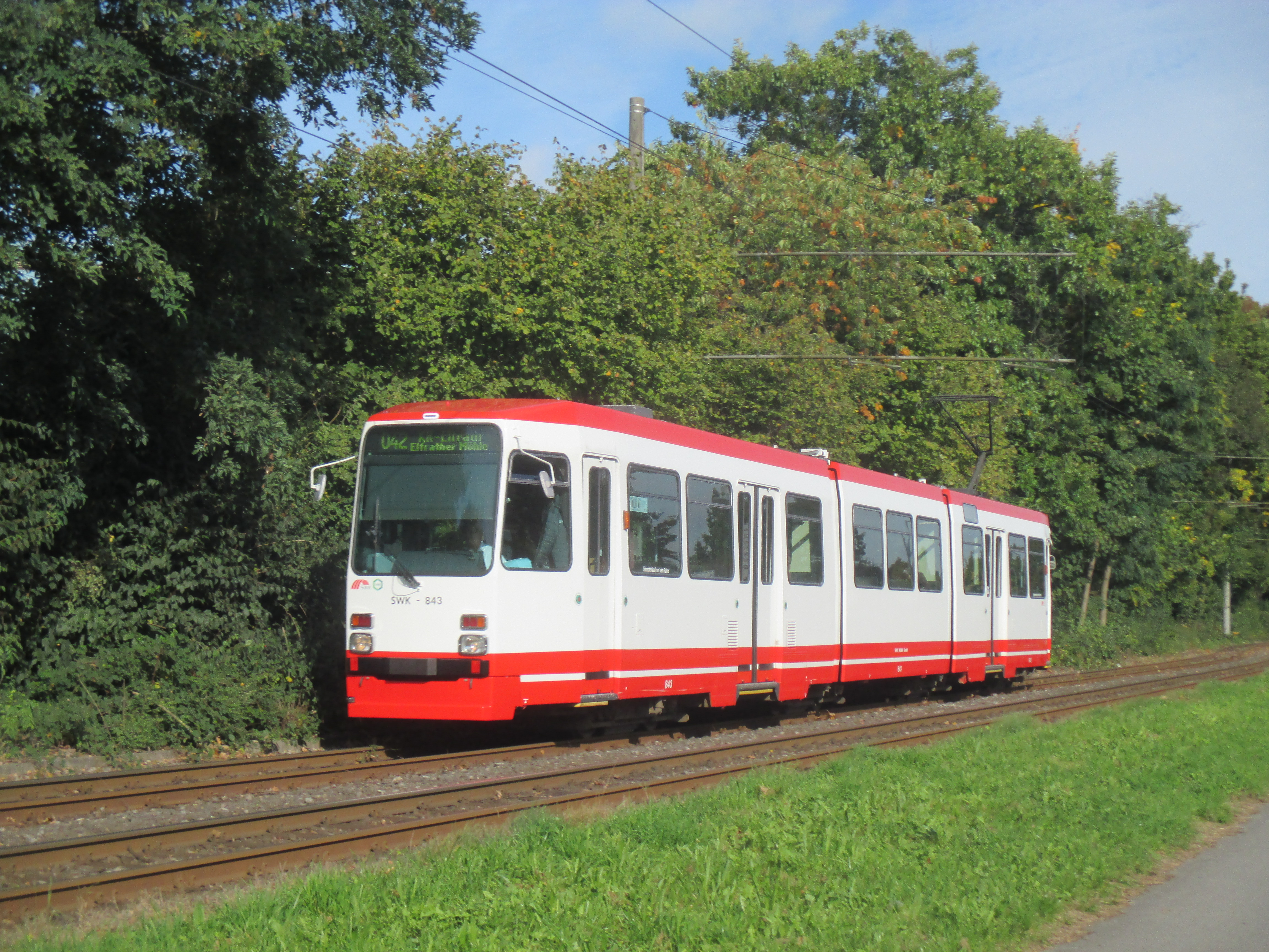 29.09.2017, (H) ThyssenKrupp Nirosta.